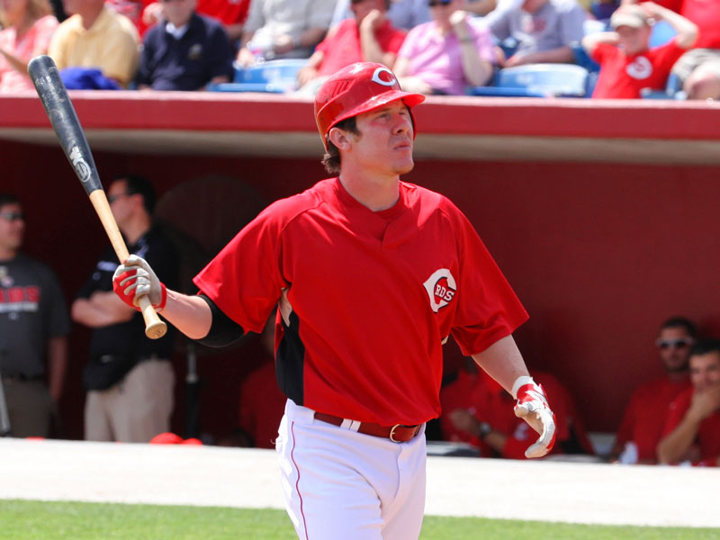 Ryan Hanigan, spring training 2009. 22:45, 8 April 2009 . . BubbaFan . . 800×600 (76 KB)